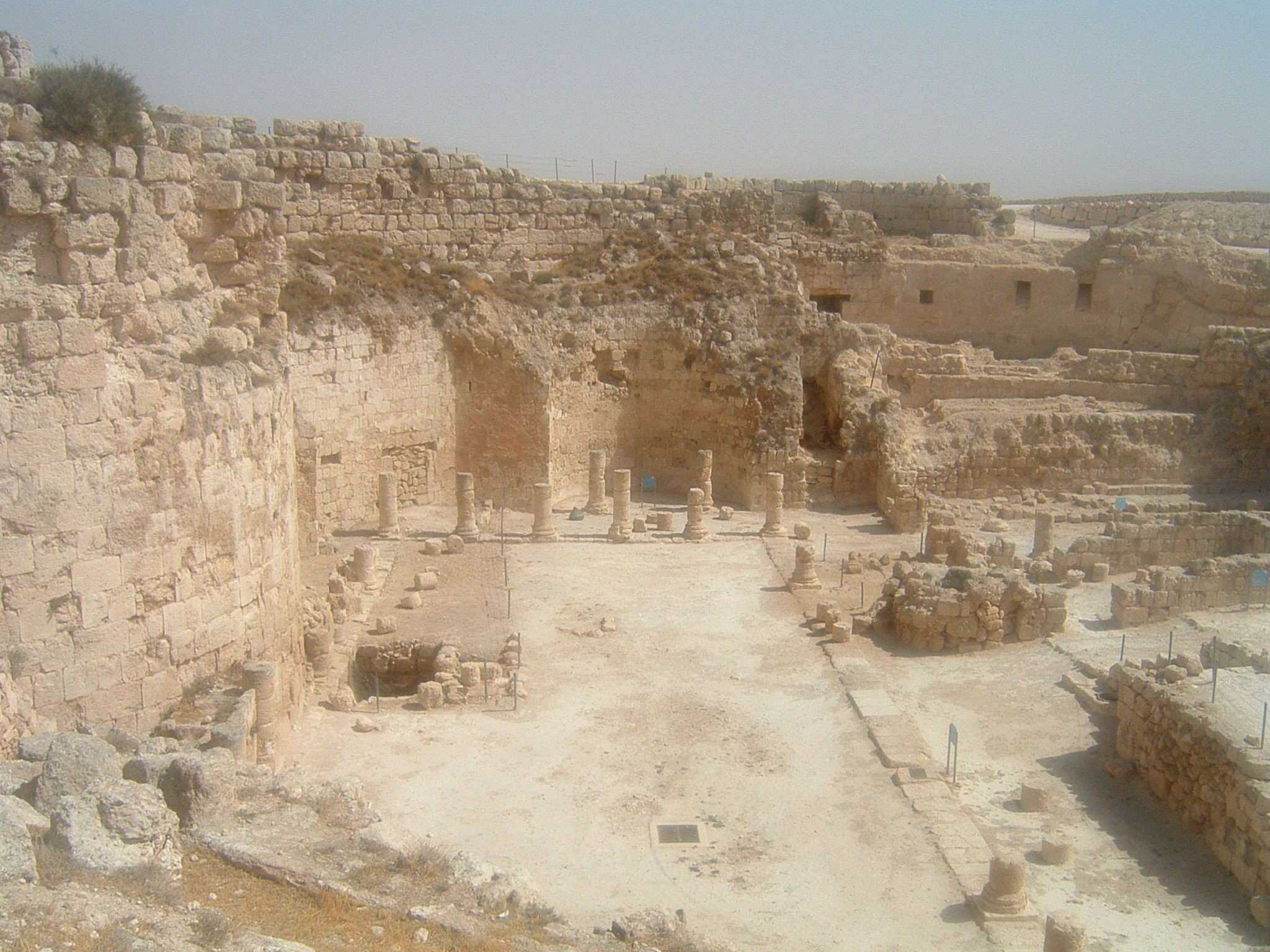 Foto scattata da me il 9 giugno 2008